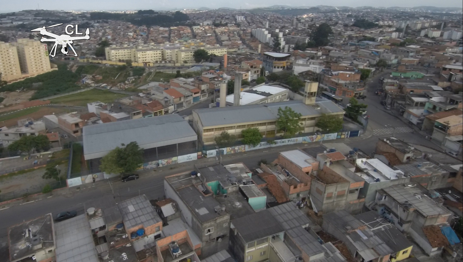 Vista aérea da Escola Municipal Euzebio